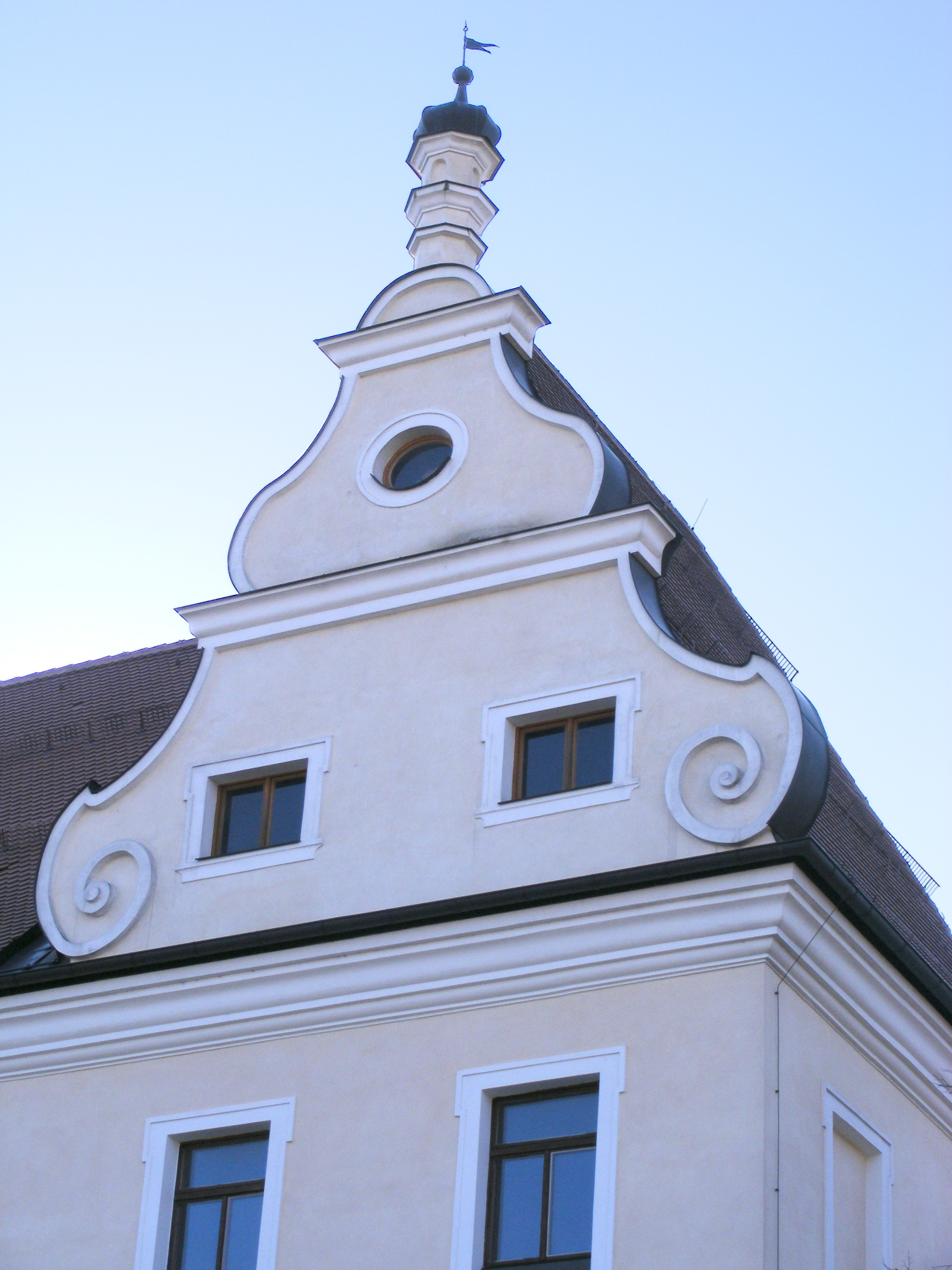 Amberg - Maltesergebäude (vom Malteserplatz gesehen), Detail